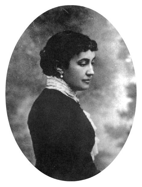 Мария Сергеевна Долгорукова(1846—1936), в первом браке была за князем Александром Васильевичем Долгоруковым (1839—1876), во втором (с 1897) — за Павлом Константиновичем Бенкендорфом (1853—1921).